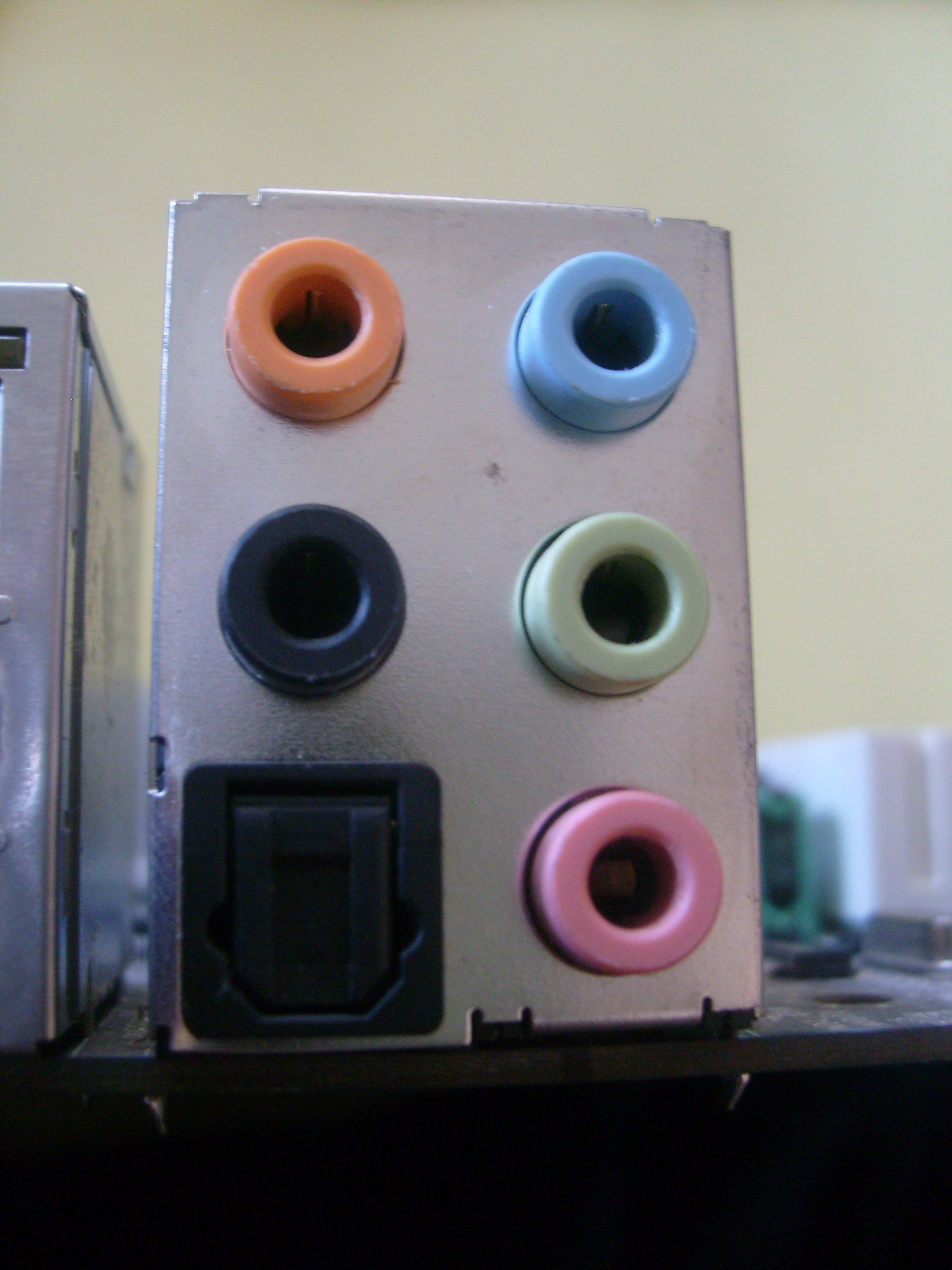 Entrada/Salida de audio de la placa madre foxconn n15235, tomada con una camara samsung s730 el dia 13 de febrero del 2010